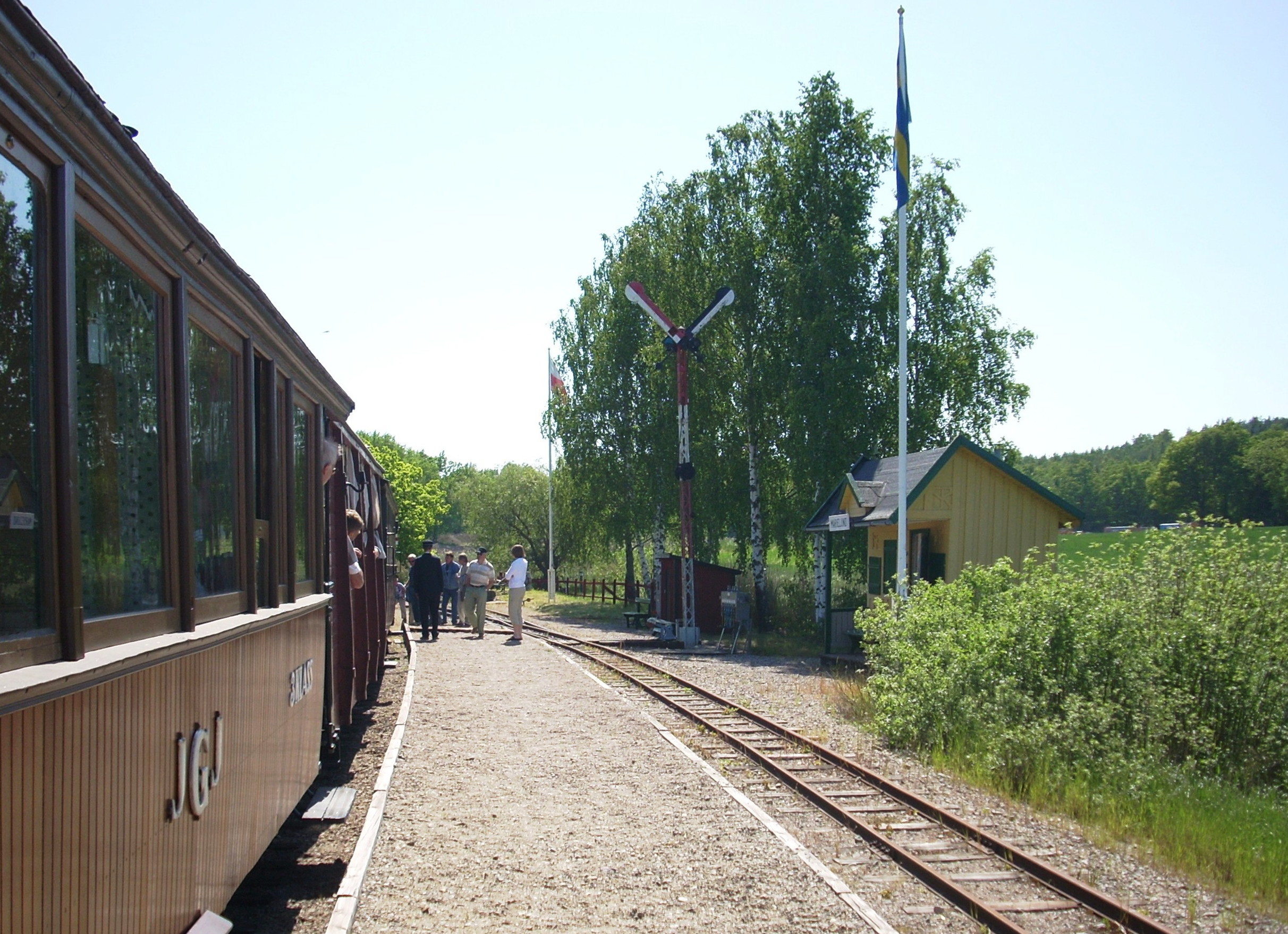 Marielunds station